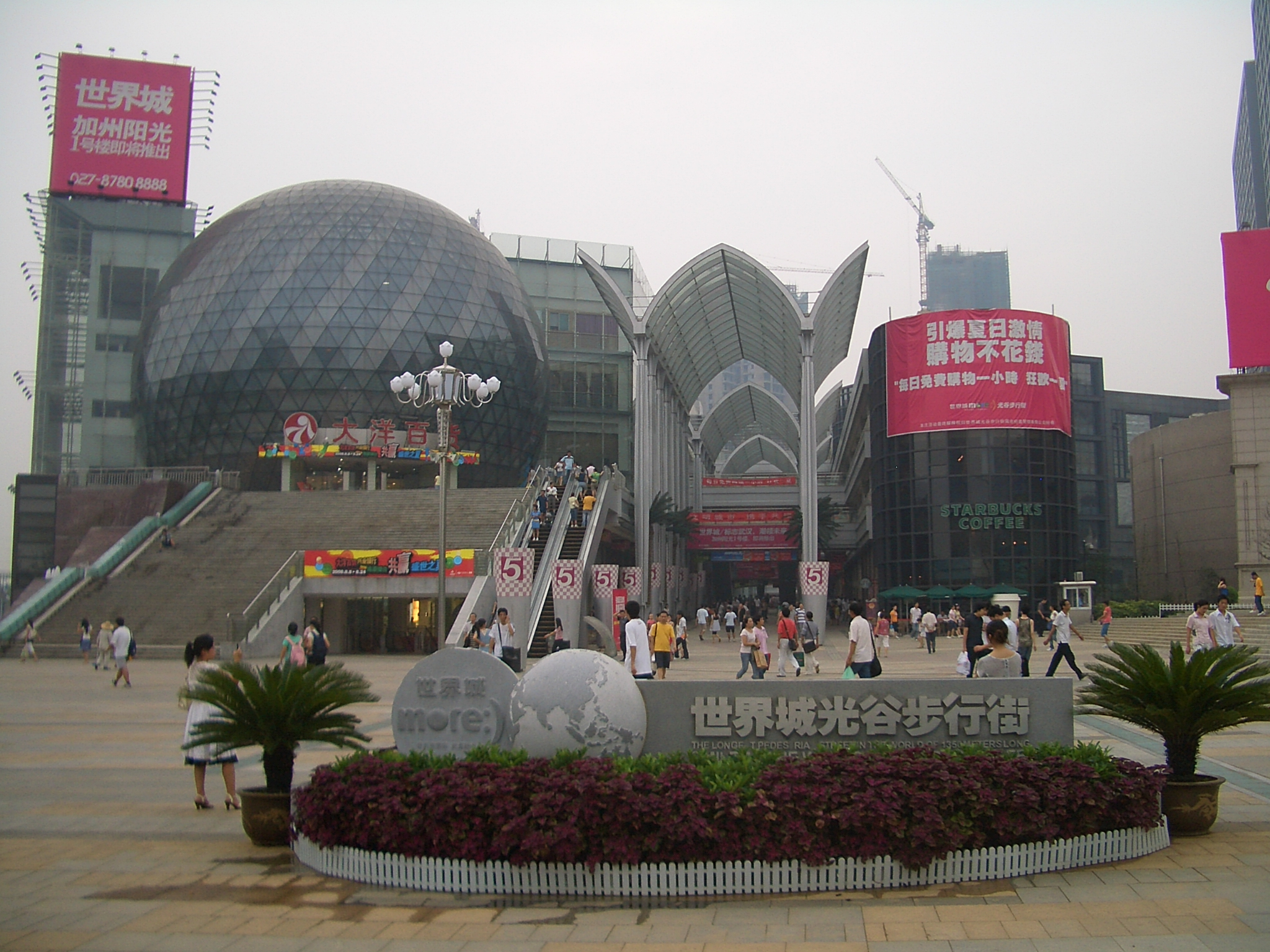 Guanggu Square, Wuhan